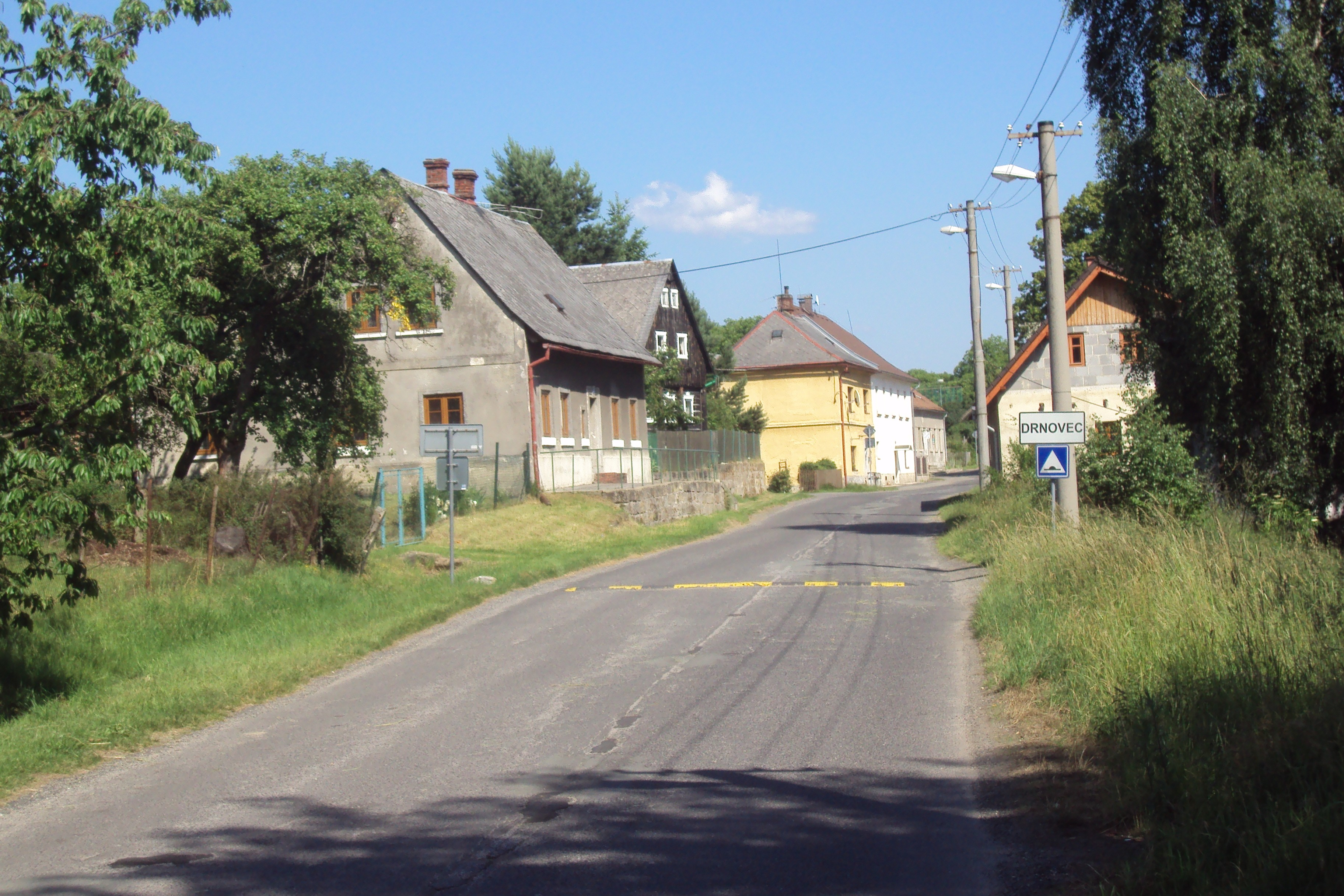 Začátek obce od Cvikova